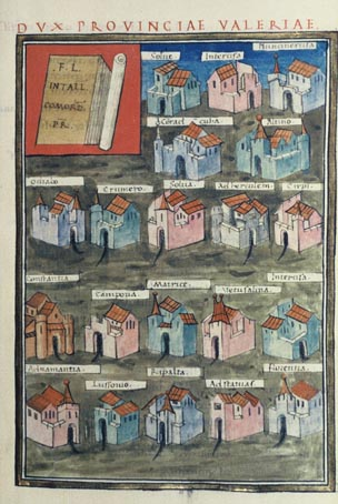 Dux Valeriae ripensis from Notitia dignitatum